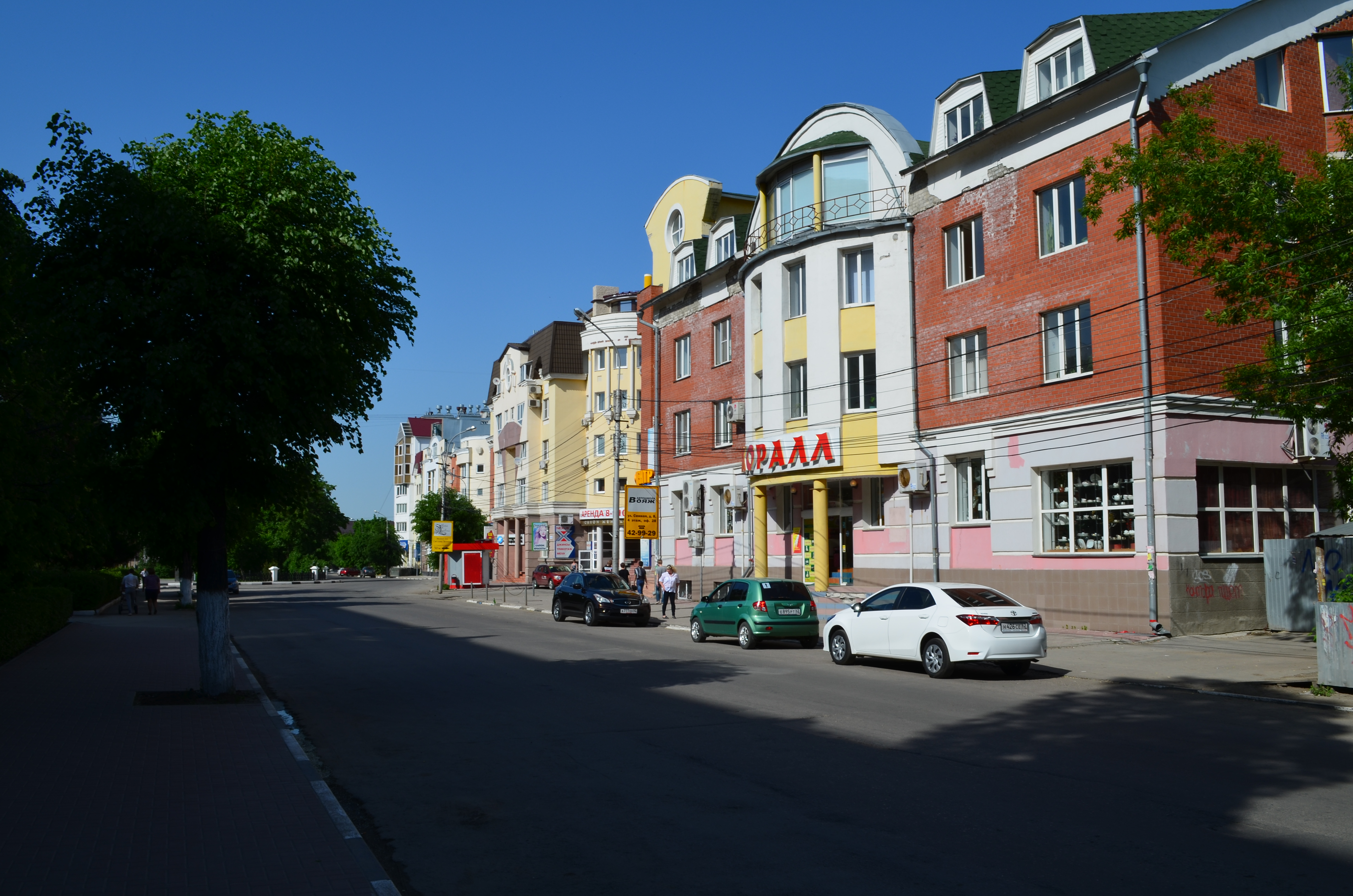 Рязань,ул.Сенная.